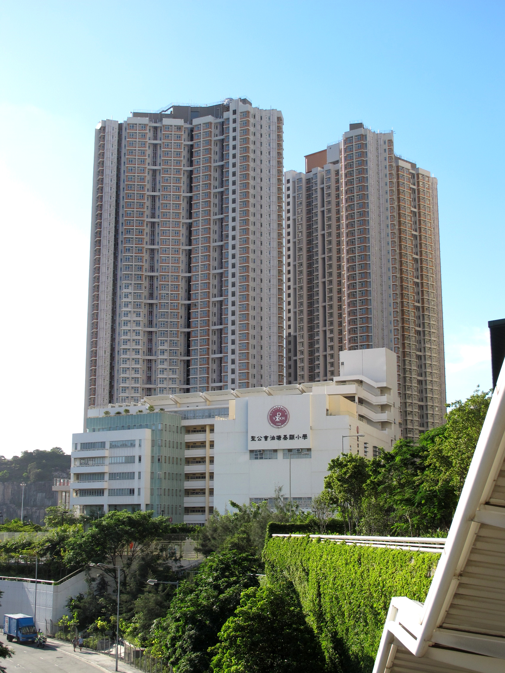 Yau Lai Estate Phase 5 油麗邨第5期